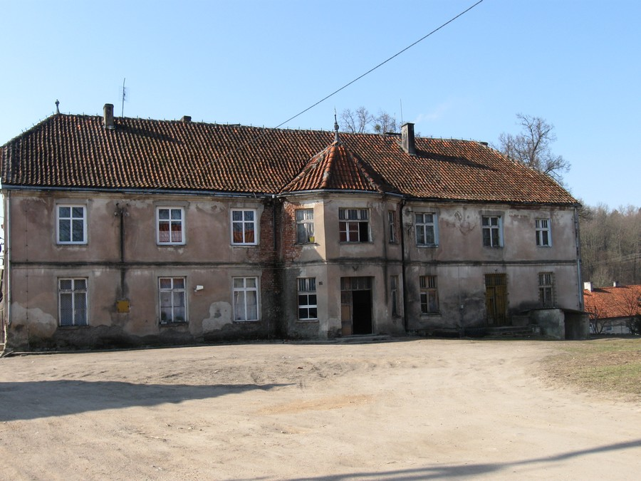 Ustnik, dwór w zespole dworsko-folwarcznym